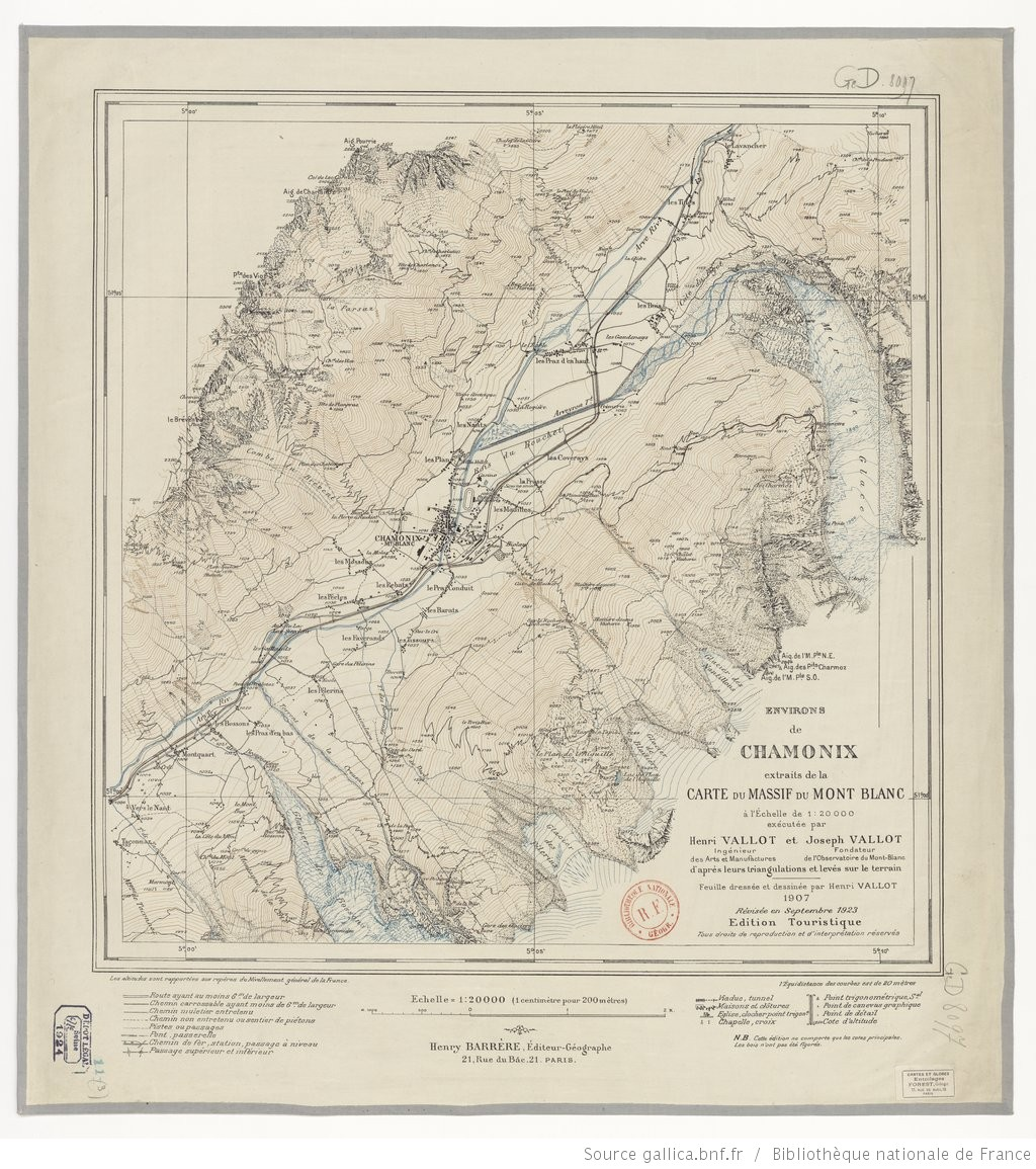 Feuille extraite de la carte du Mont-Blanc au 1/20000 en 22 feuilles par Henri Vallot et Joseph Vallot.